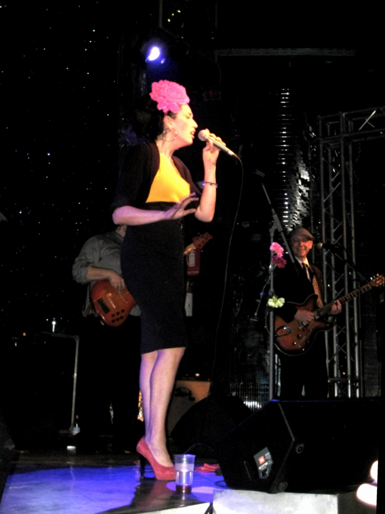 La cantante Nina Zilli